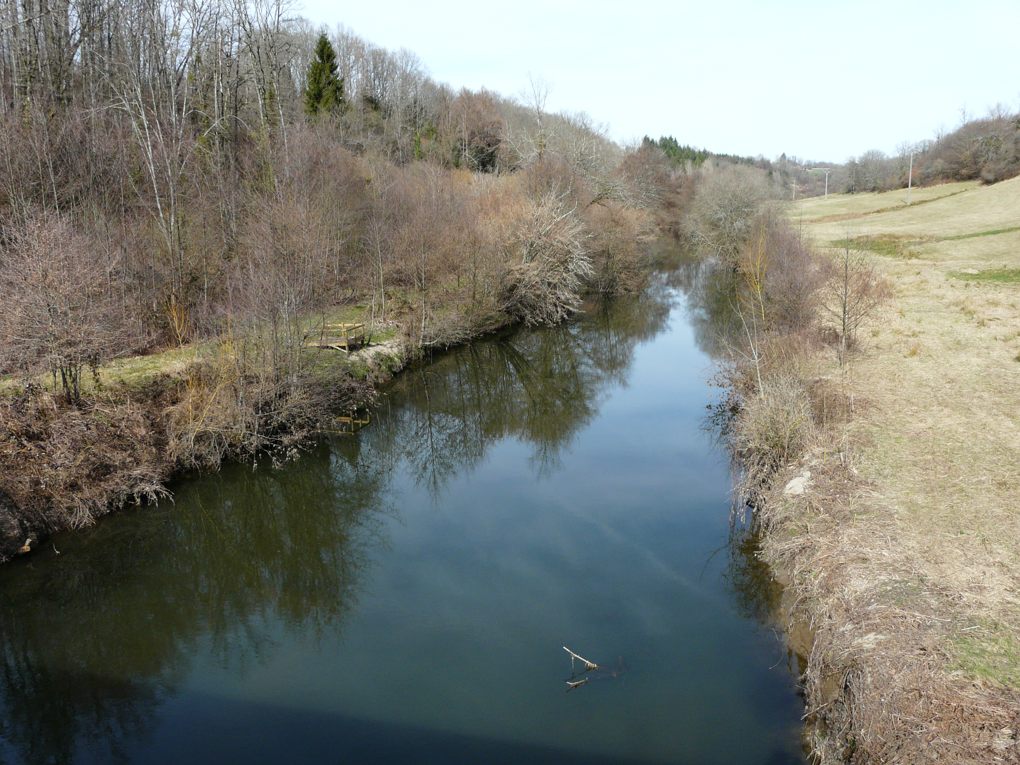 L'Auvézère au pont de la RD75, Payzac, Dordogne, France